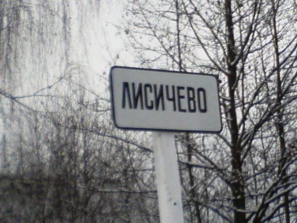 табличка